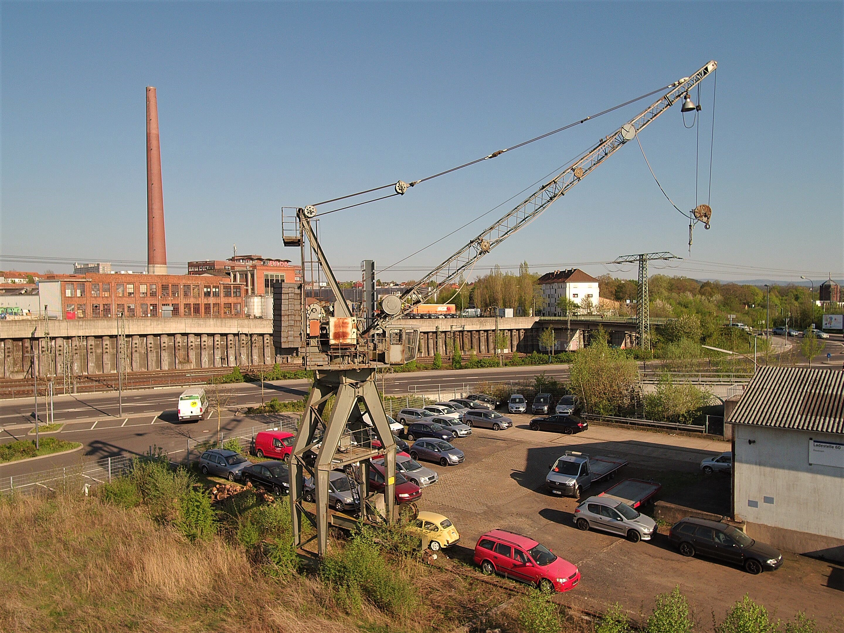 Schienenkran in Fulda auf dem Gelände einer ehemaligen Schrotthandlung